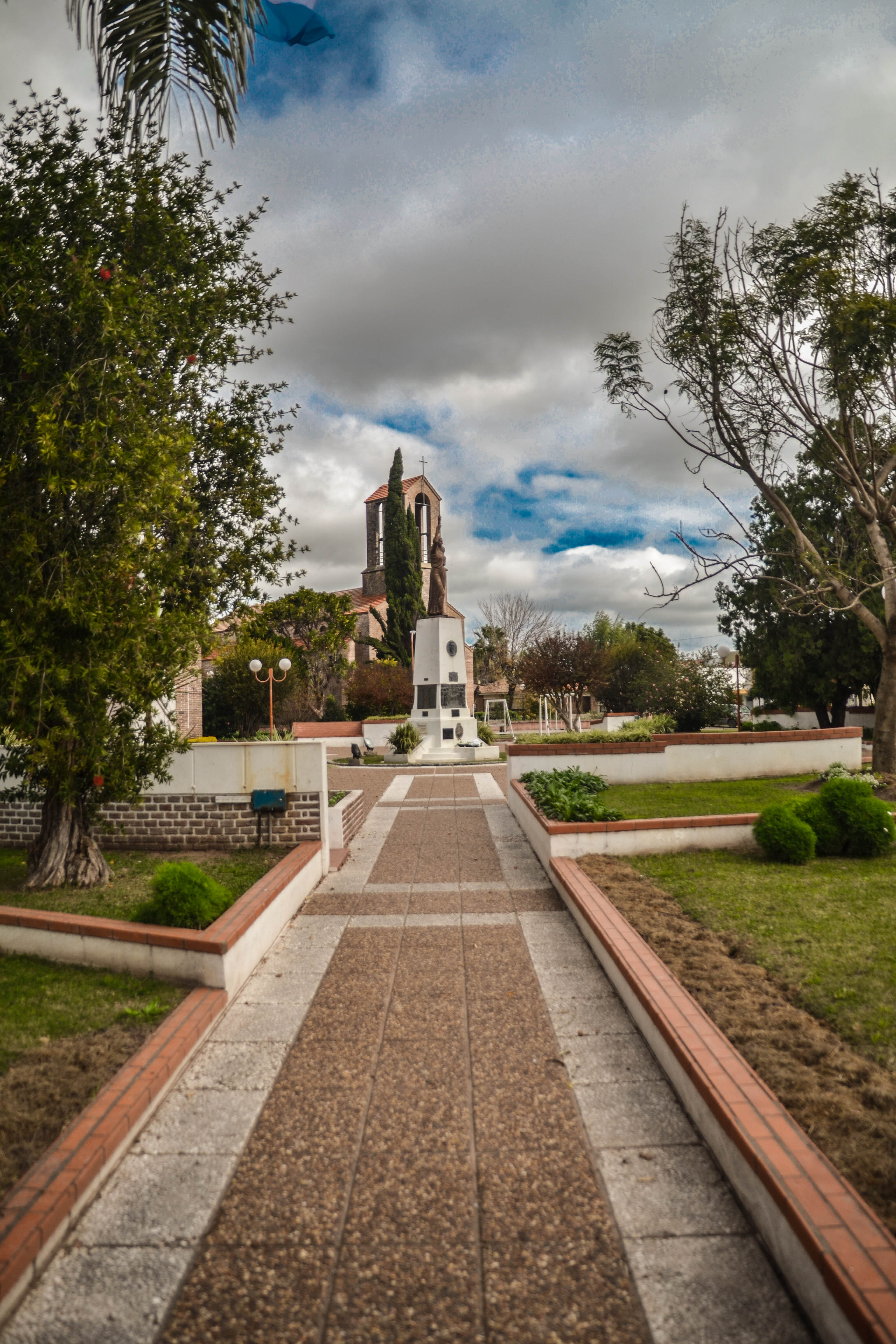 Plaza principal "independencia"- Comuna de Humboldt (Santa Fe)